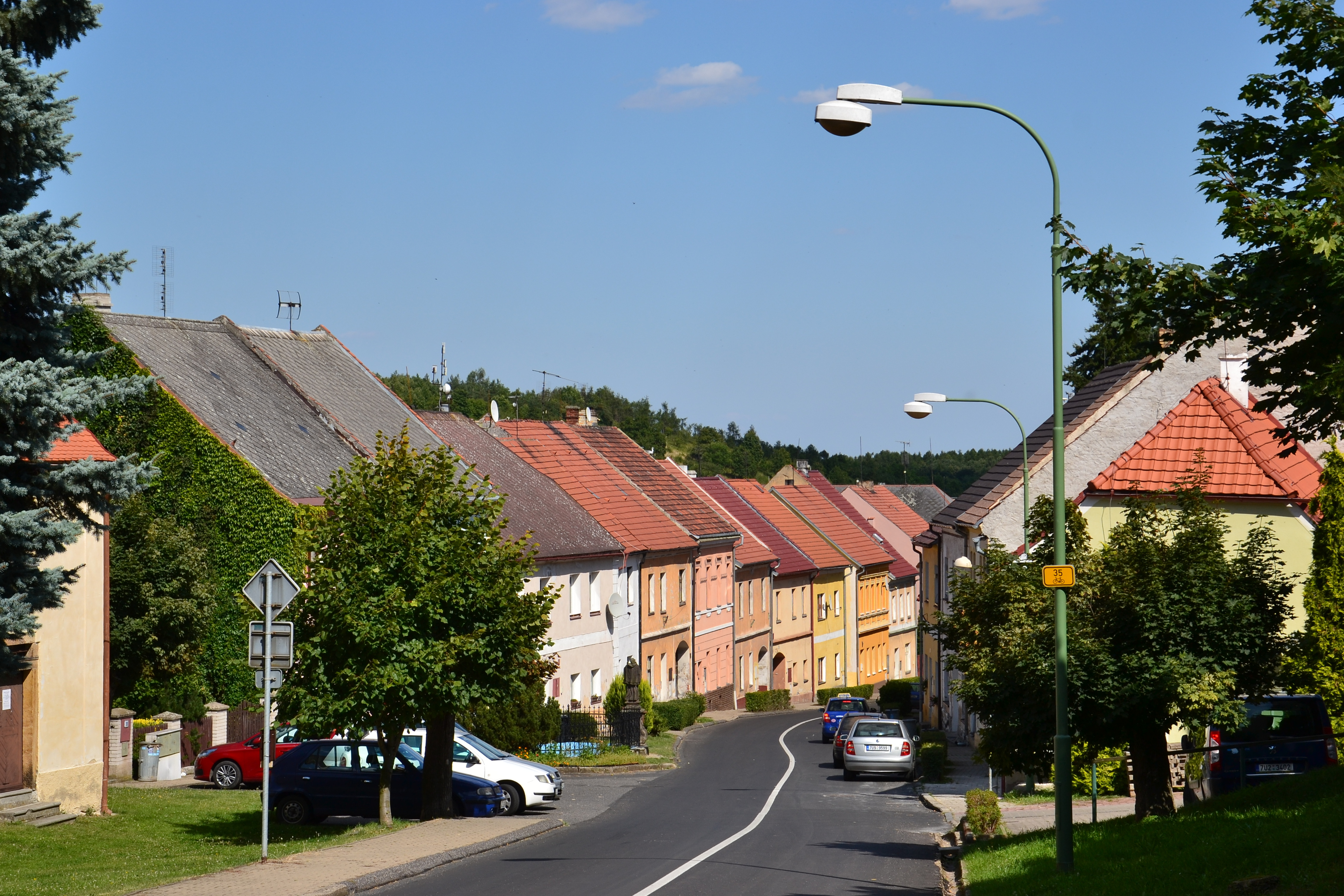 Mašťov – Kostelní ulice